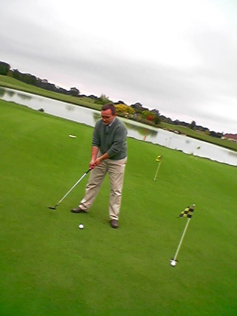 Andrei Goultsev Андрей Гульцев